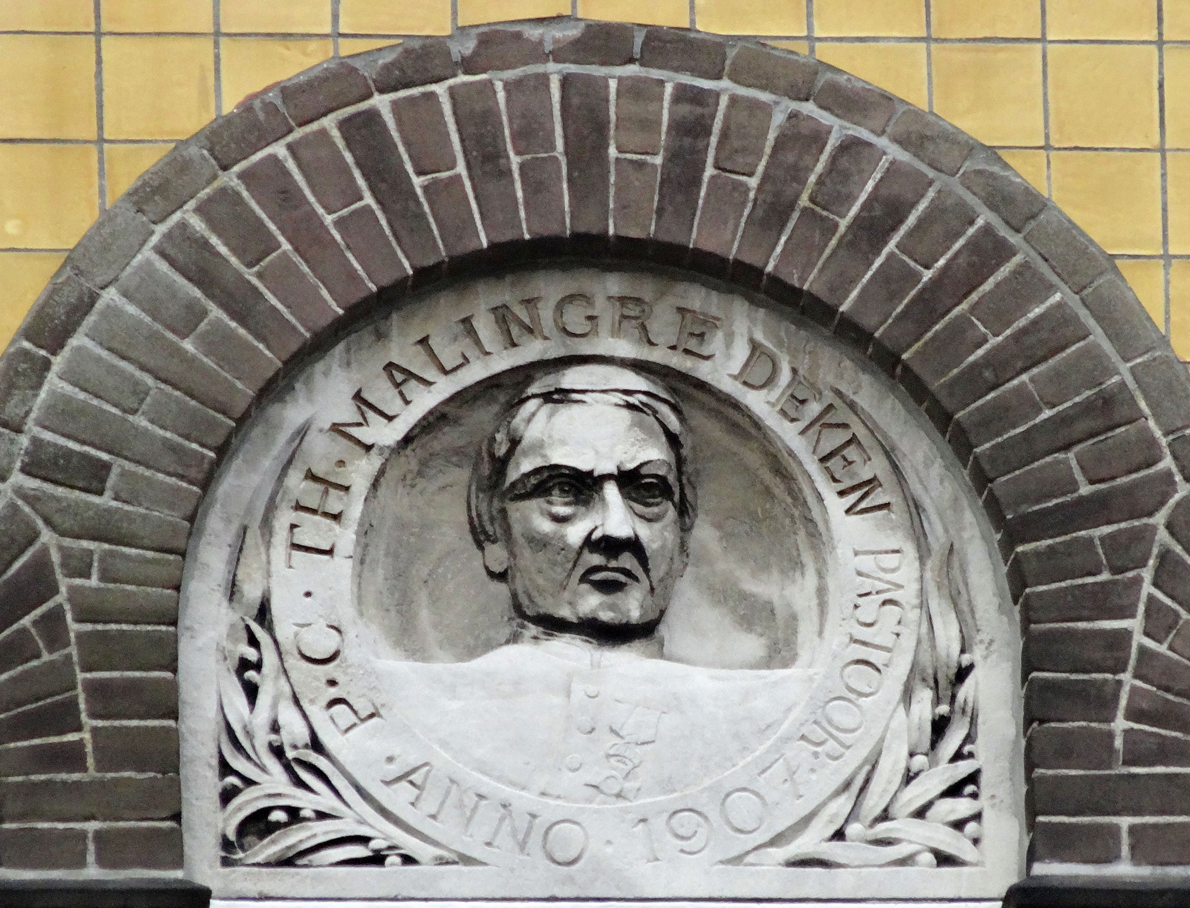 Plaquette stichter P.C.Th. Malingré van het gebouw van de Theodorusstichting Westhaven 33 te Gouda